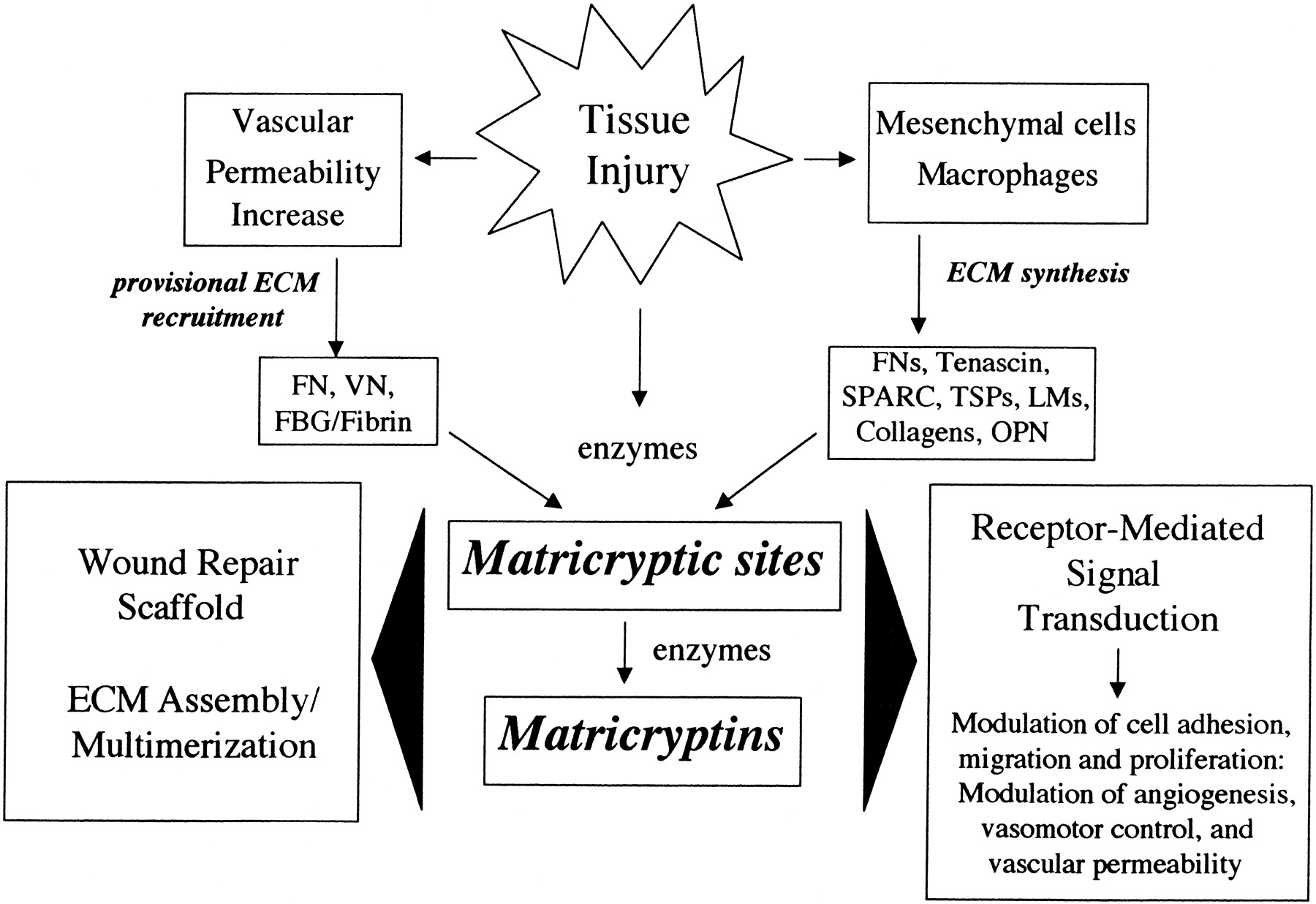 foto mostrando funcionamento da liberaçao de sitios matricripticos.